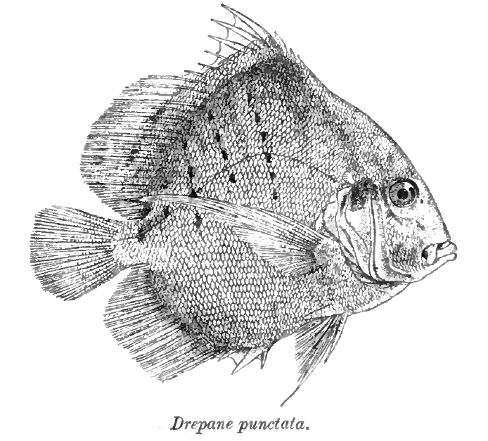 Drepane punctata (Linnaeus, 1758)